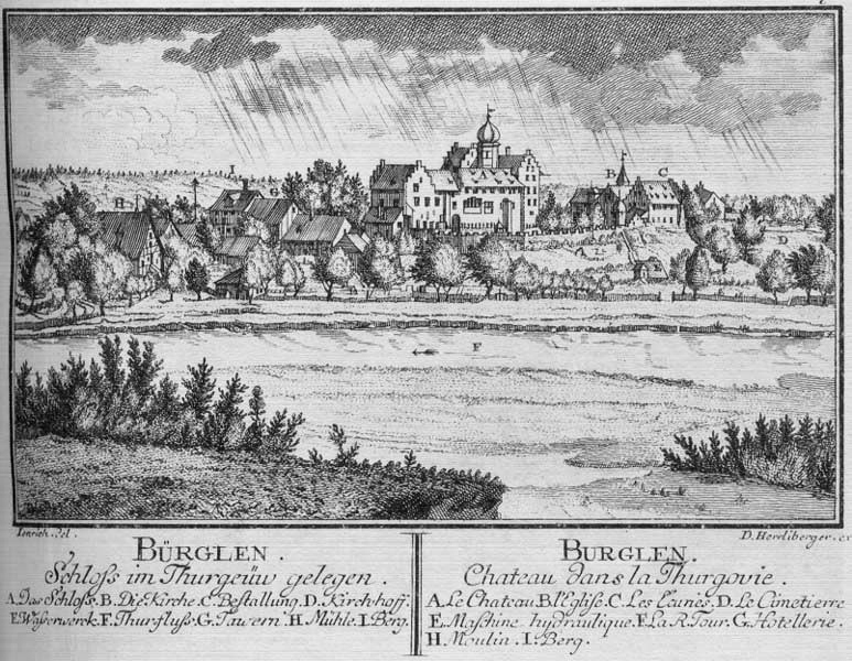 Schloss Bürglen im Kanton Thurgau 1758 in der Topographie der Eidgenossenschaft von David Herrliberger, Blatt 243